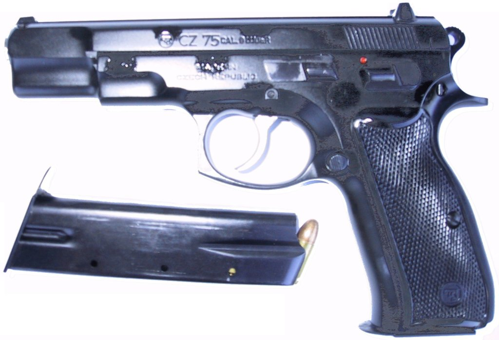 Pistole CZ75 (selbst aufgenomme, FDL)